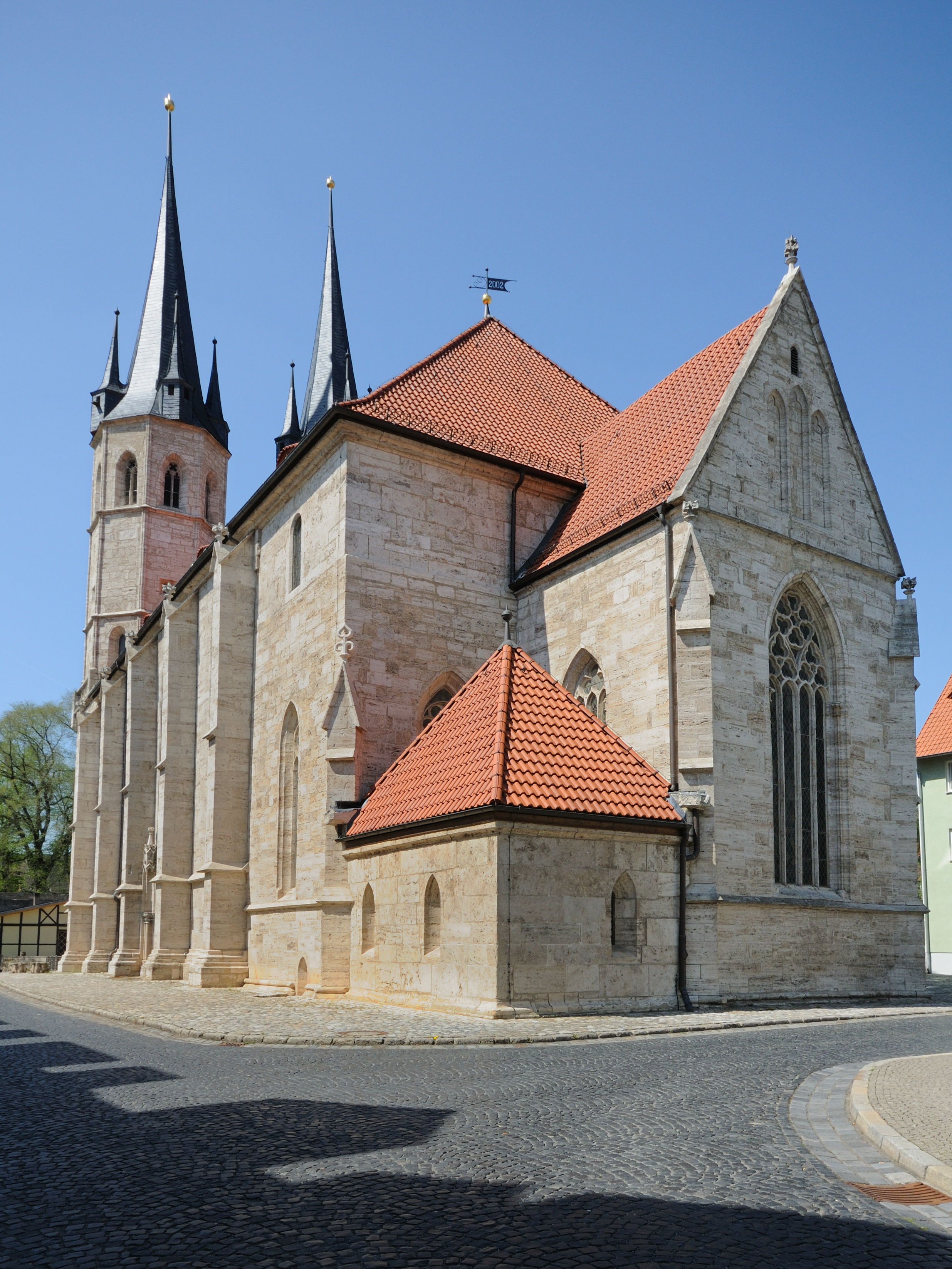 Jakobikirche Mühlhausen/Thüringen (Ab 2001 Einbau der Stadtbibliothek)